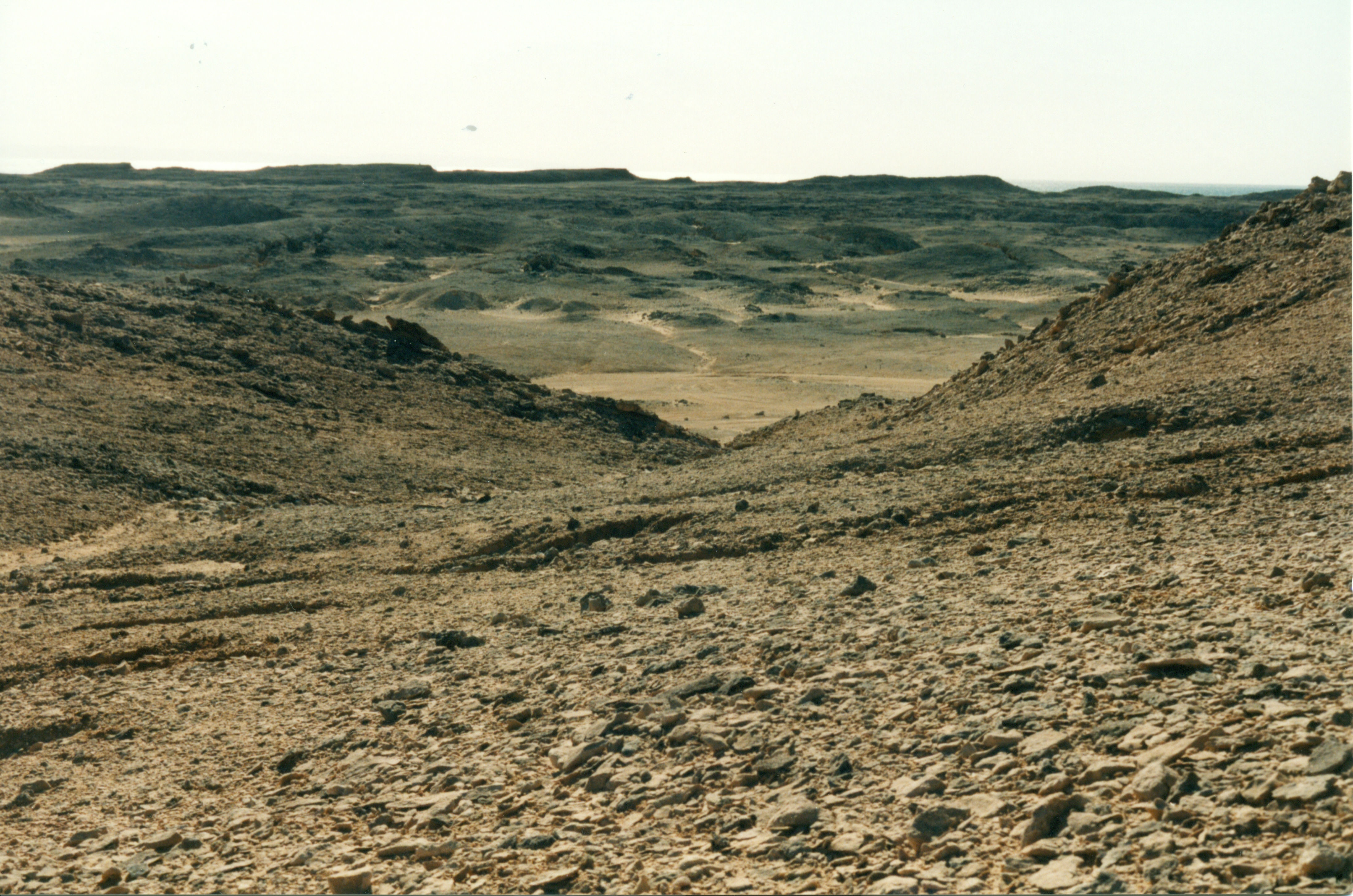 Ras Mohammed